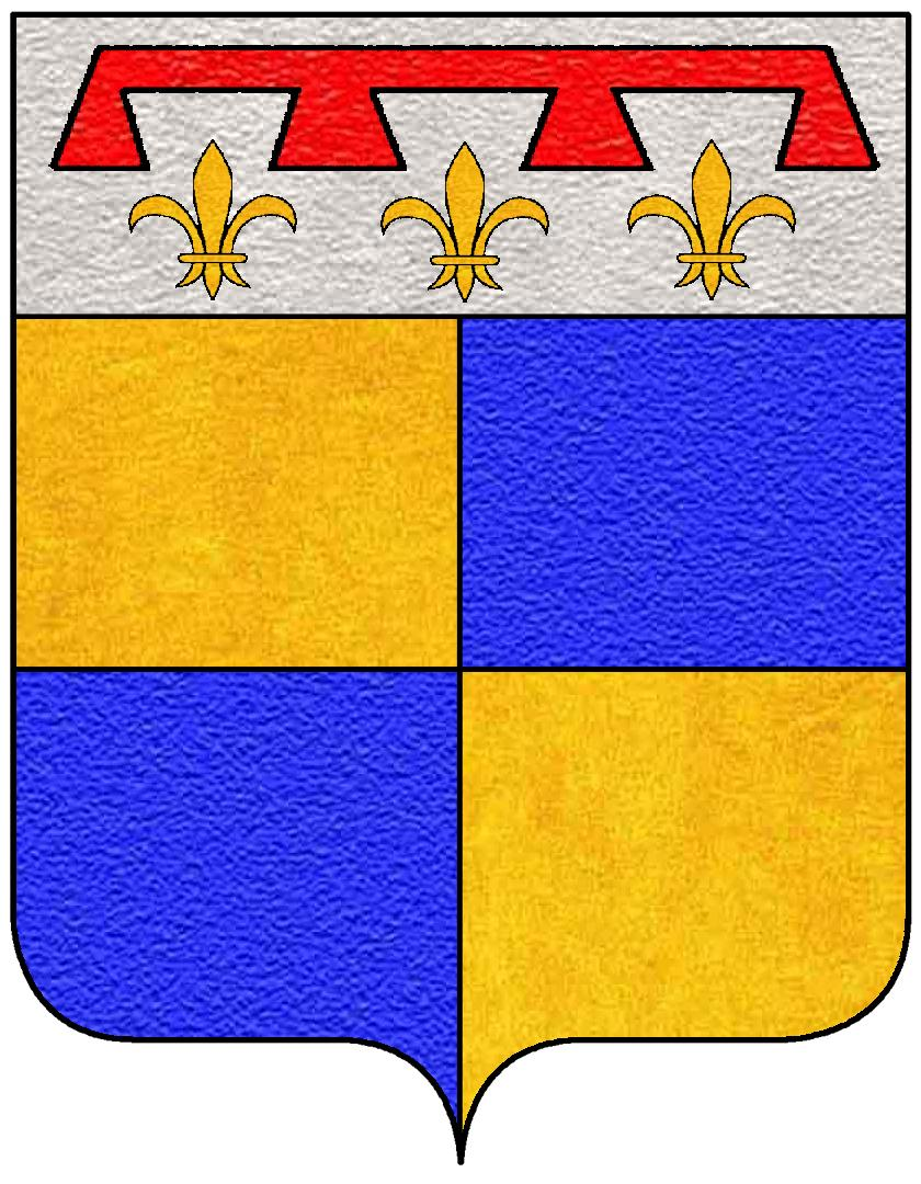 Stemma della famiglia Manfredi